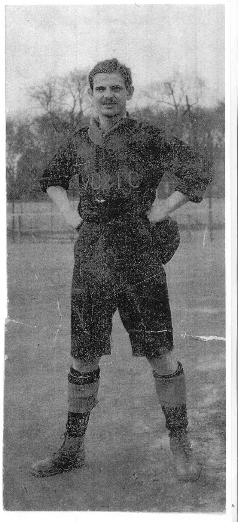 Max Leuthe, österr. Fußballspieler